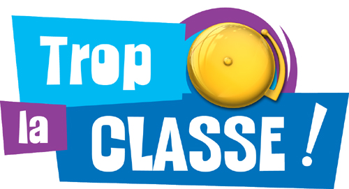 Logo de la série Trop la Classe